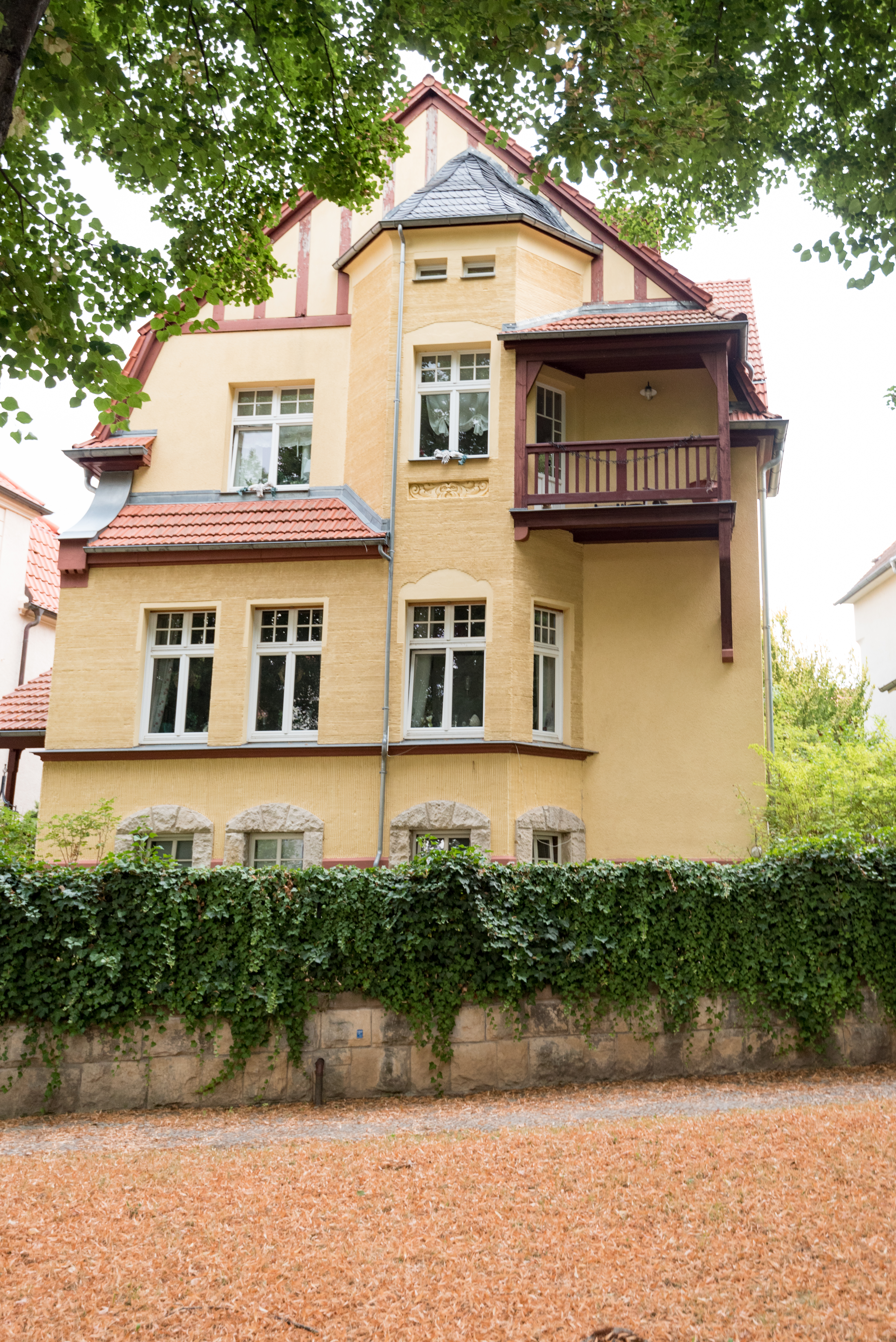 Naumburg (Saale), Buchholzstraße 17